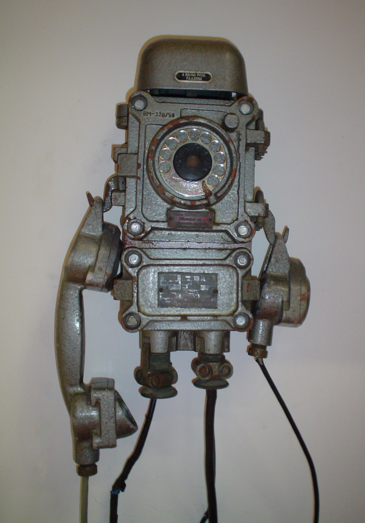 Mineja diskuma telefono